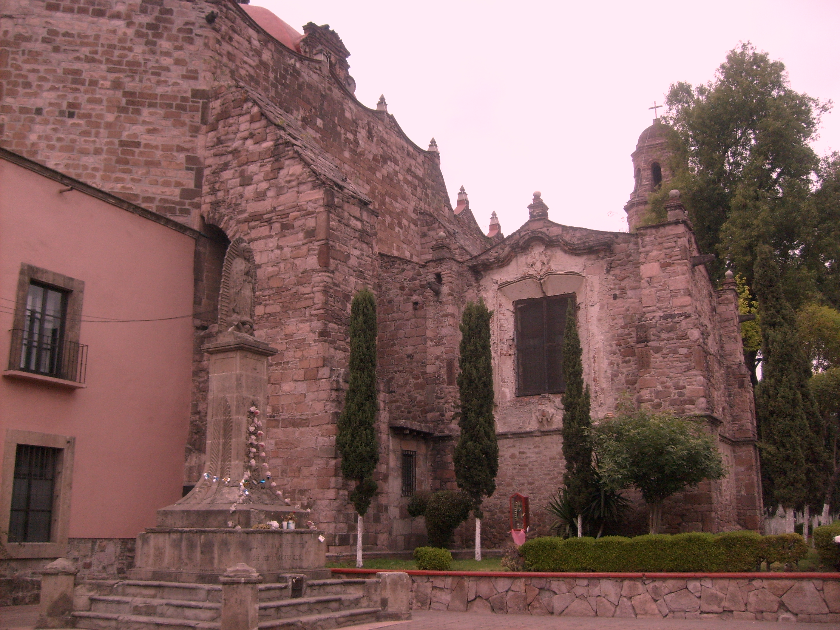 Parte trasera de la Catedral de Corpus Christi en el centro histórico del municipio Tlalnepantla de Baz, Estado de México, en México.